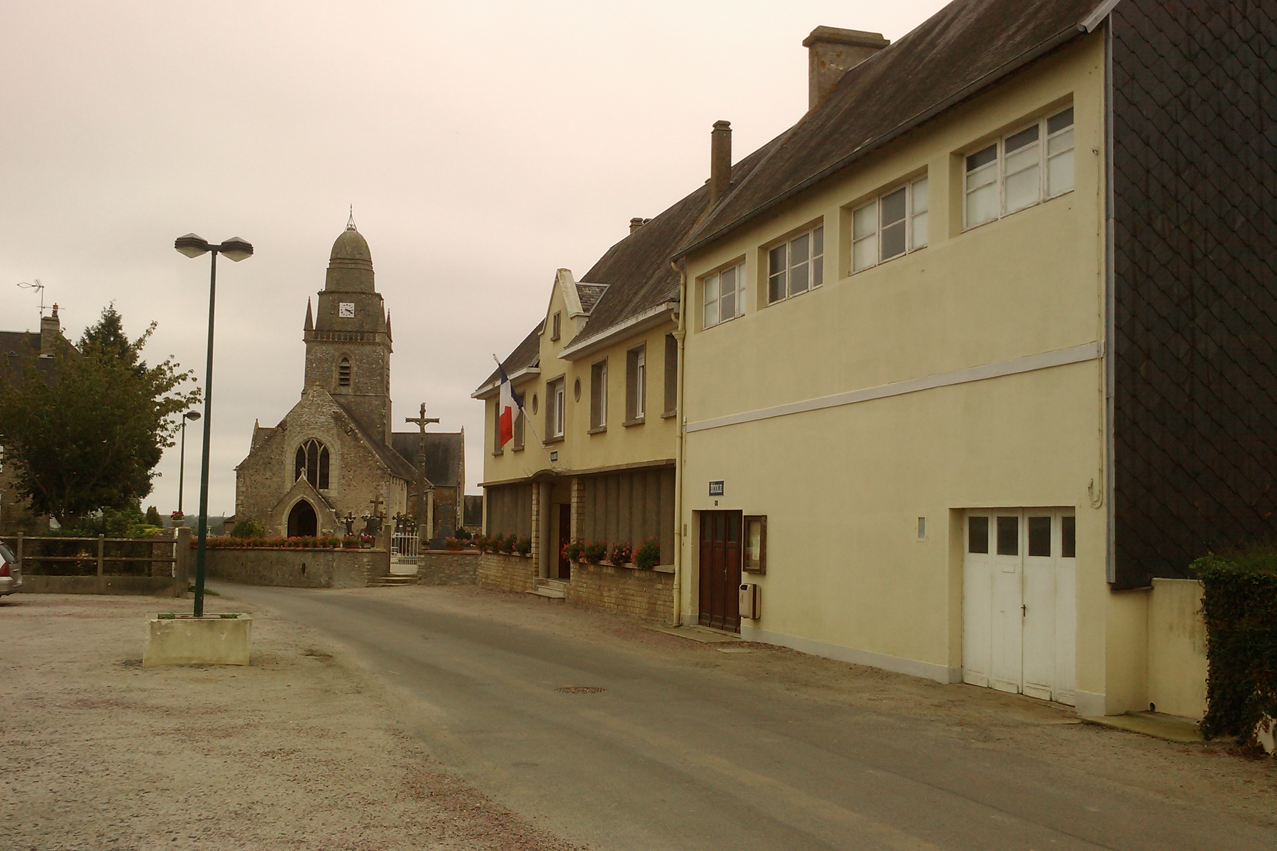 Église Saint-Martin et mairie des Veys